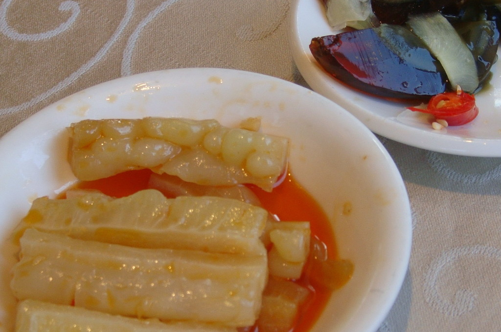 side dishes with bitter melon and century eggs